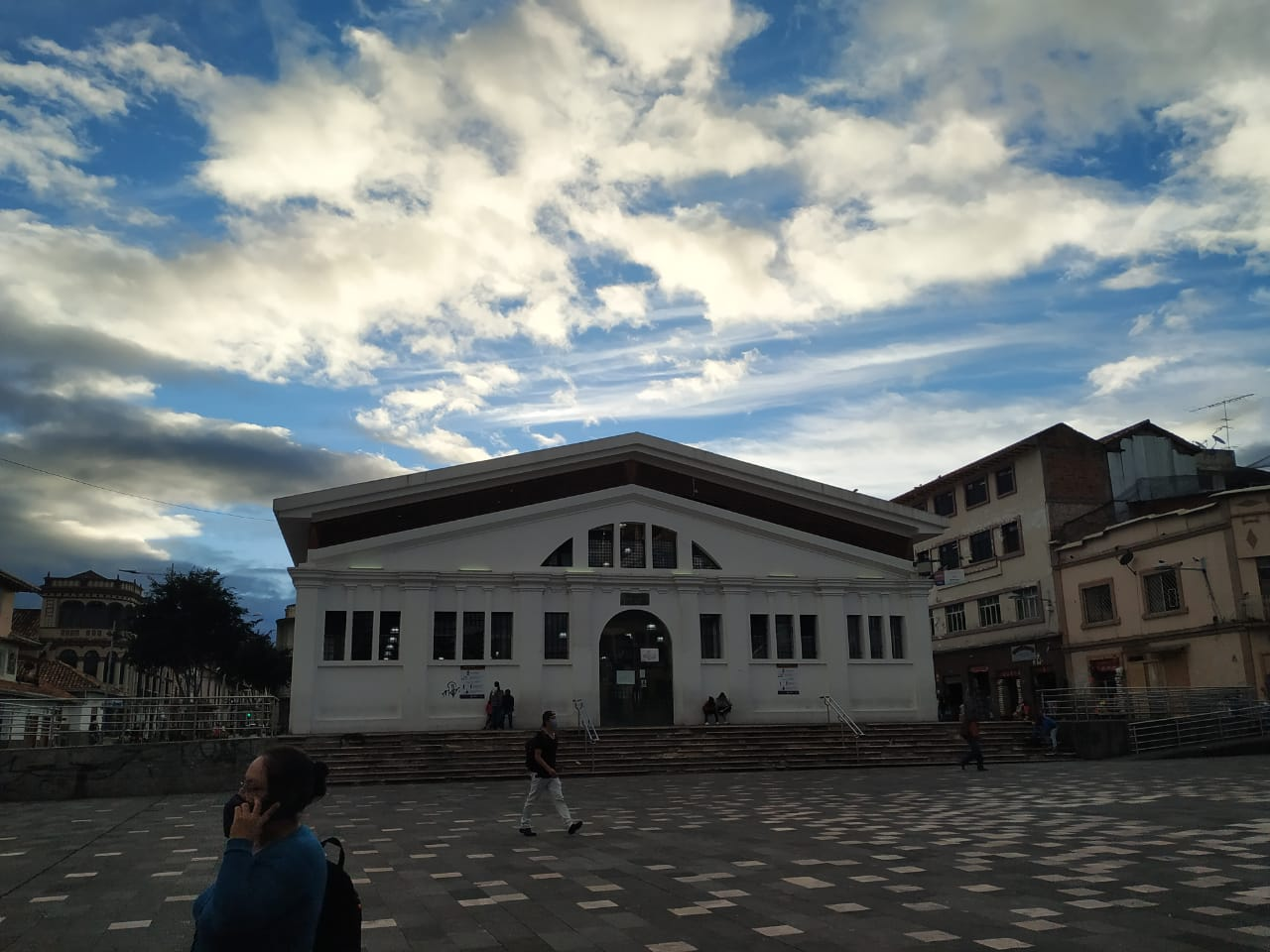 Vista frontal del mercado 9 de Octubre